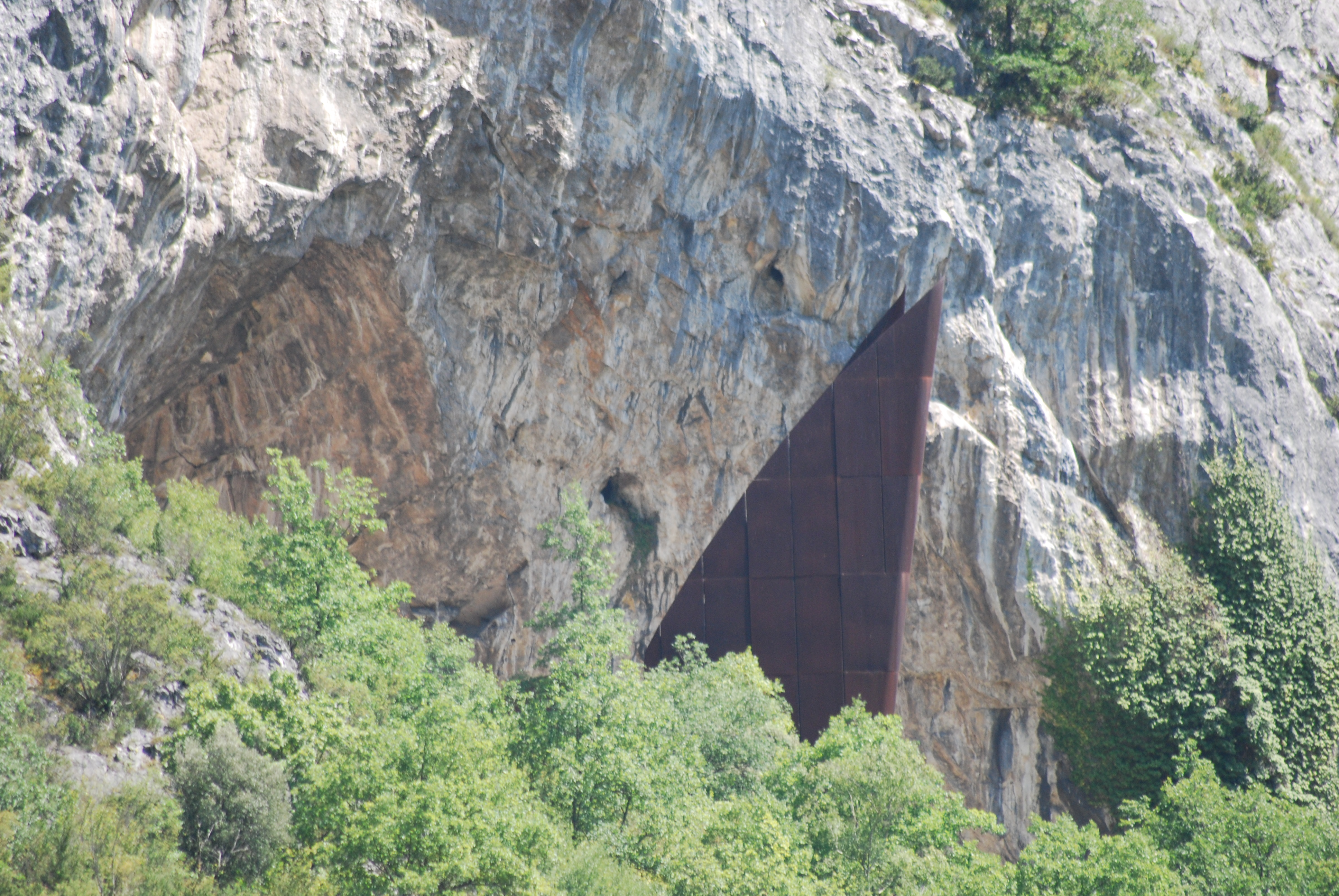 Entrée de la grotte de Niaux vue depuis celle de la Vache, Ariège.